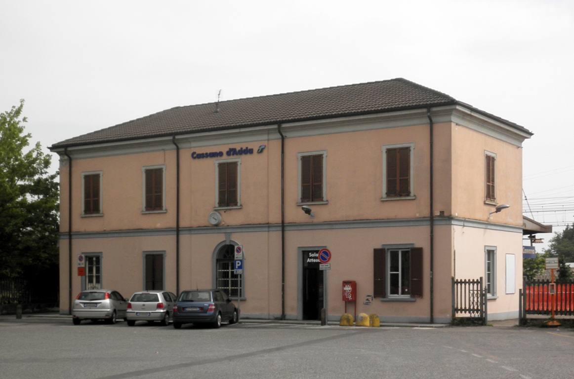 Stazione ferroviaria di Cassano d'Adda.